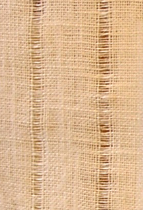 Gardin detalj av gles varp. Glesheten i varpen är åstadkommen genom gles förskedning och sedan vid skedningen. Som synes glider varptrådarna något. Jämför "glidningarna" som sker vid glesa partier i inslag: Image:Väv, Gardin mönstergles detalj inslag.jpg Se även två gardintyg tillsammans